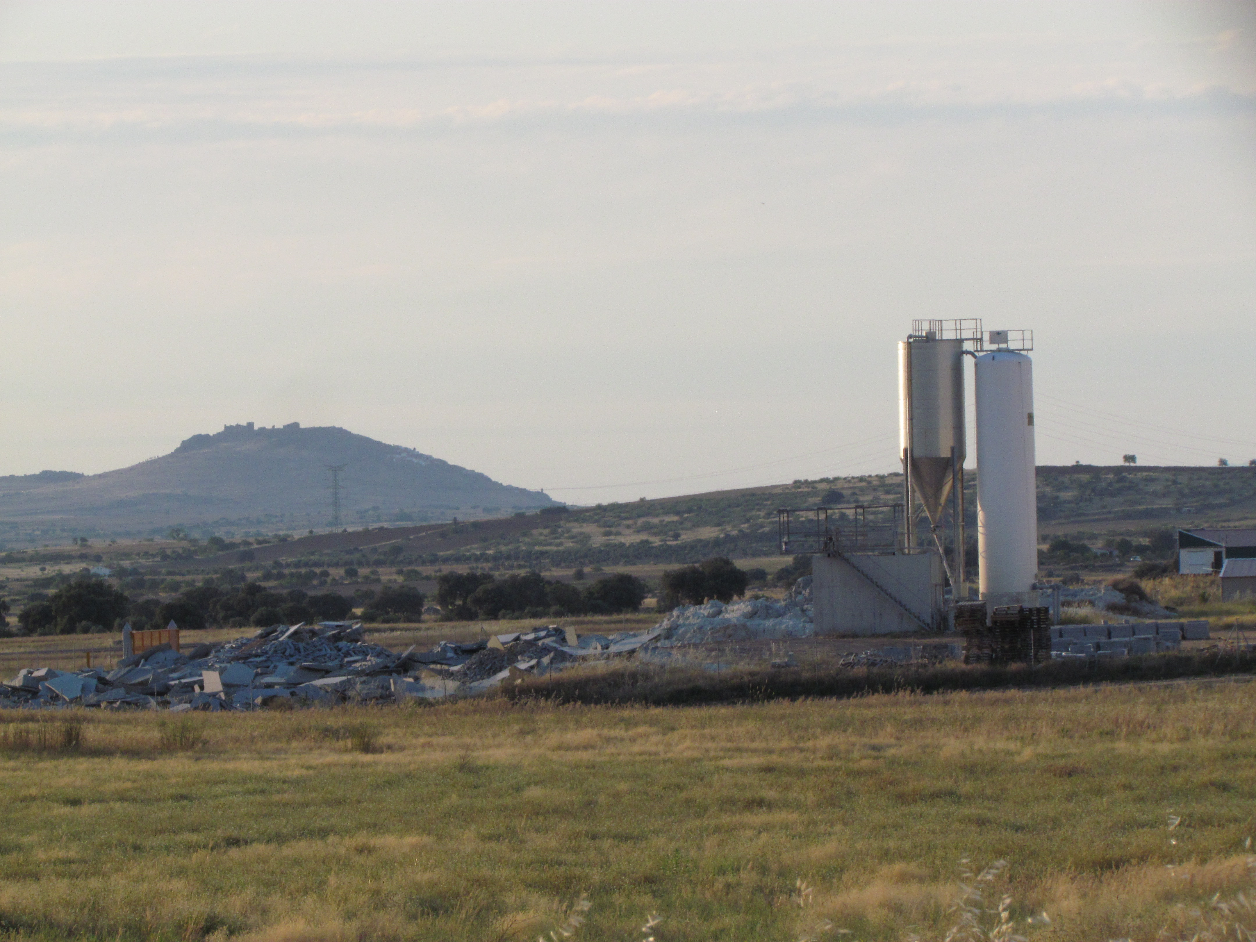 Cantera de granito situada en la parcela agraria Granzamen, al norte de Quintana de la Serena (Badajoz).